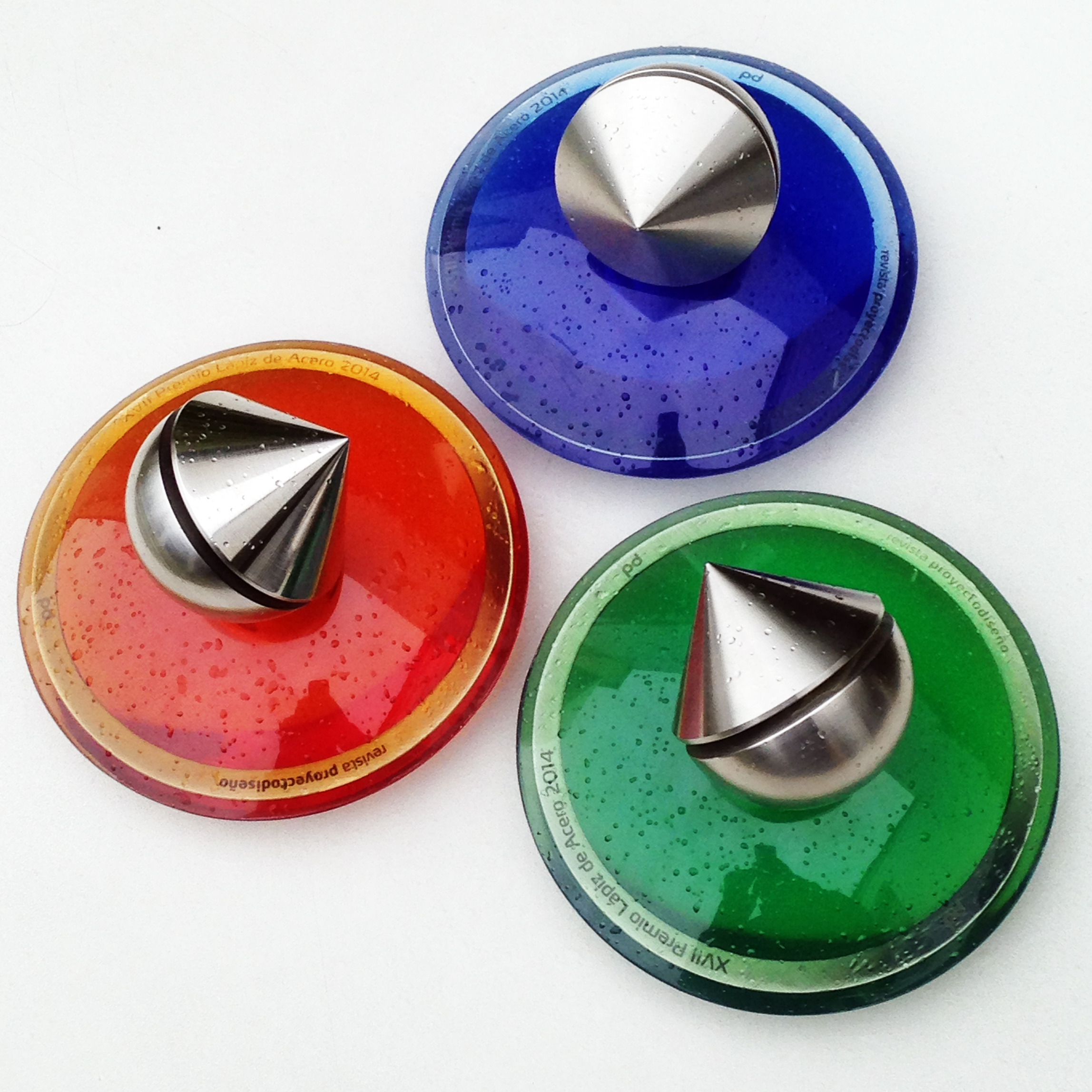 Trofeos actuales del premio Lápiz de Acero